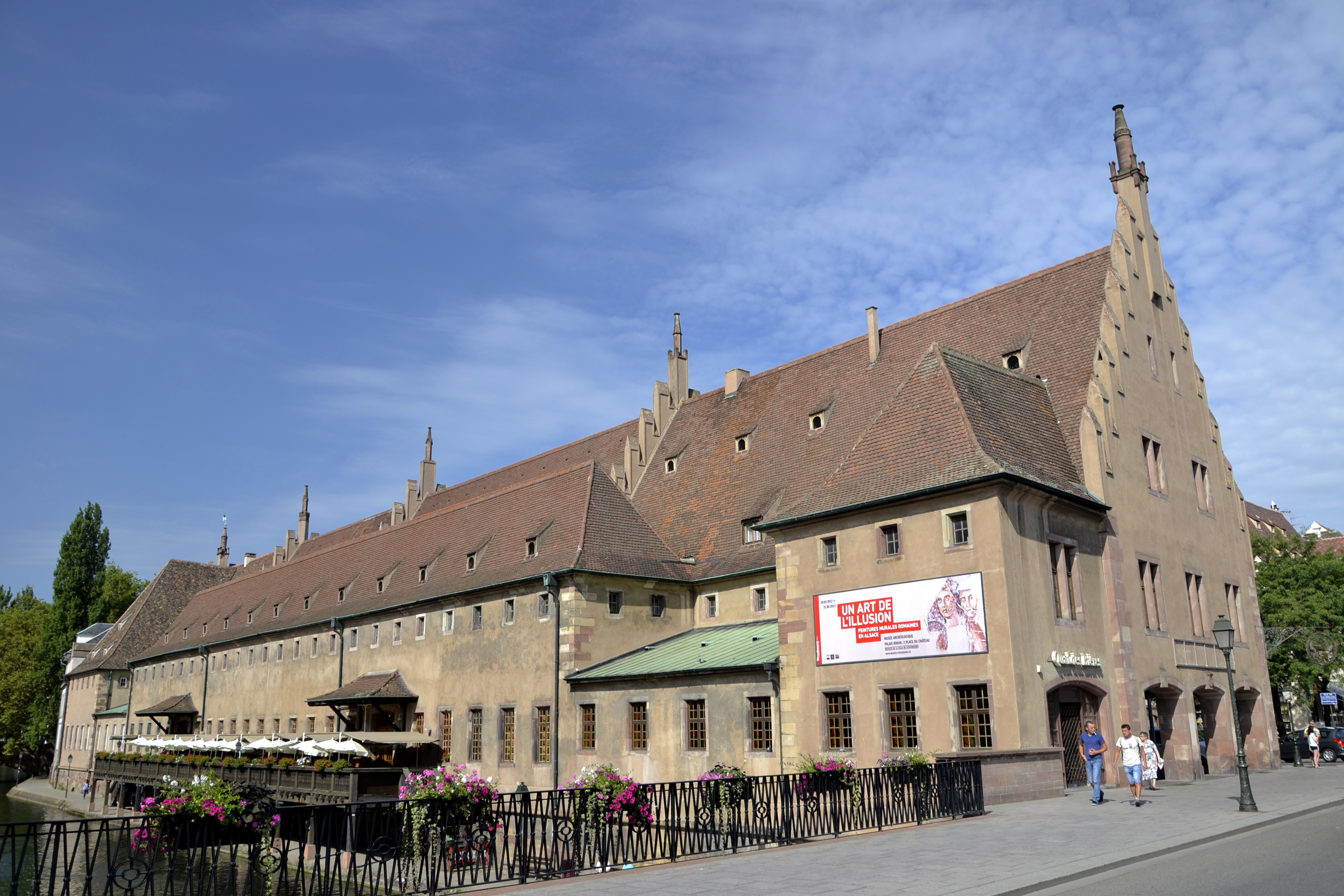 Caractéristiques Ville : Strasbourg (67000) Quartier : Ellipse insulaire Adresse: 6, rue de la Douane Livraison : 1389 Fonction : Bâtiment industriel / Usine Données techniques Niveaux : R+3 Hauteur : ±17.00 m